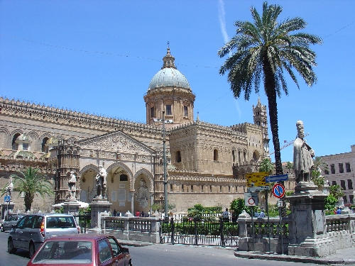 Der Dom von Palermo, Sizilien, Italien Aufnahmejahr: 2004 Andere Versionen: Keine